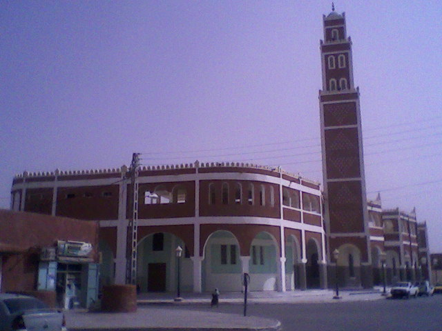 Benlekbir mosque in Algeria.